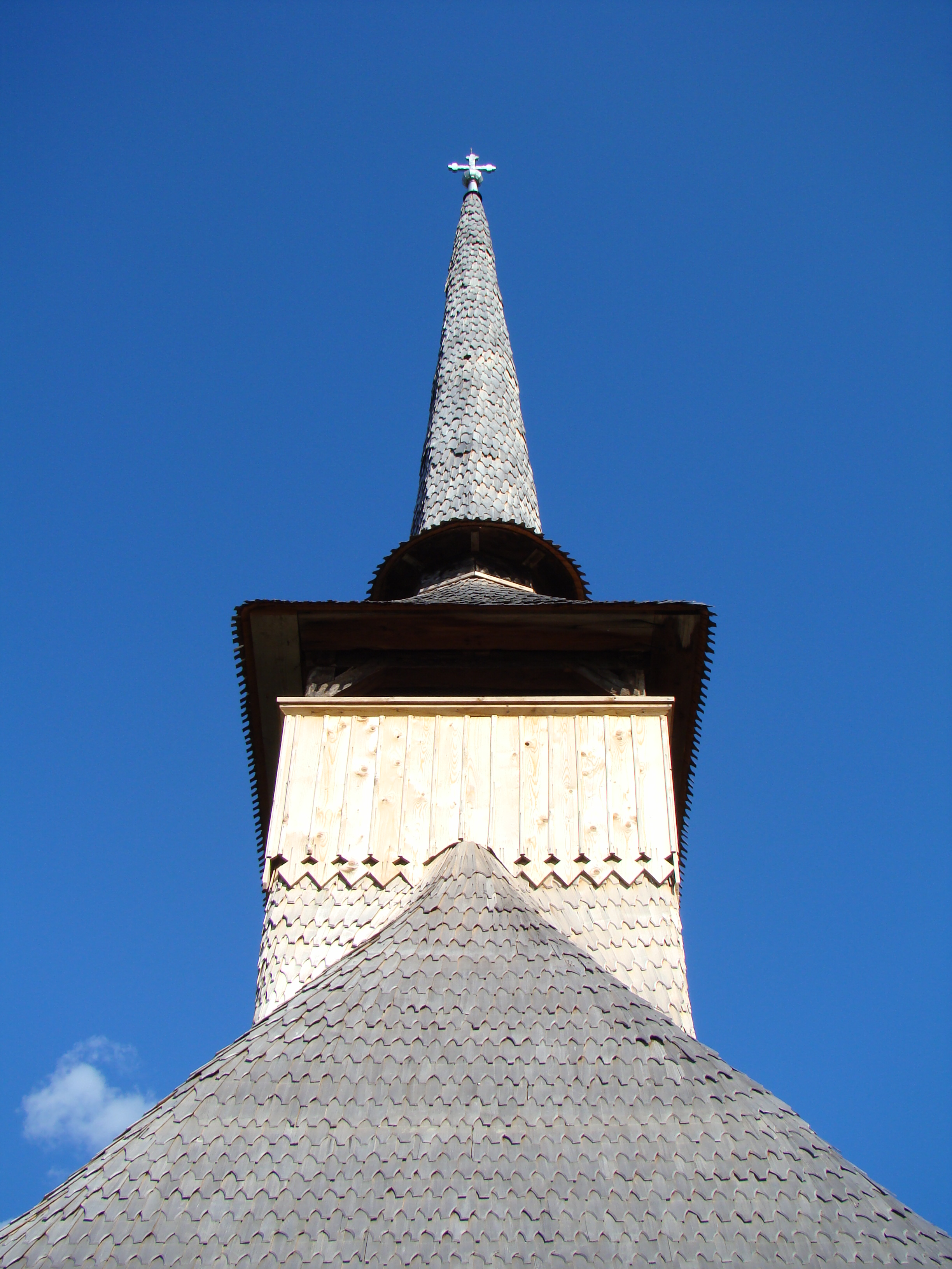 Biserica de lemn din Fânațe-Bihor